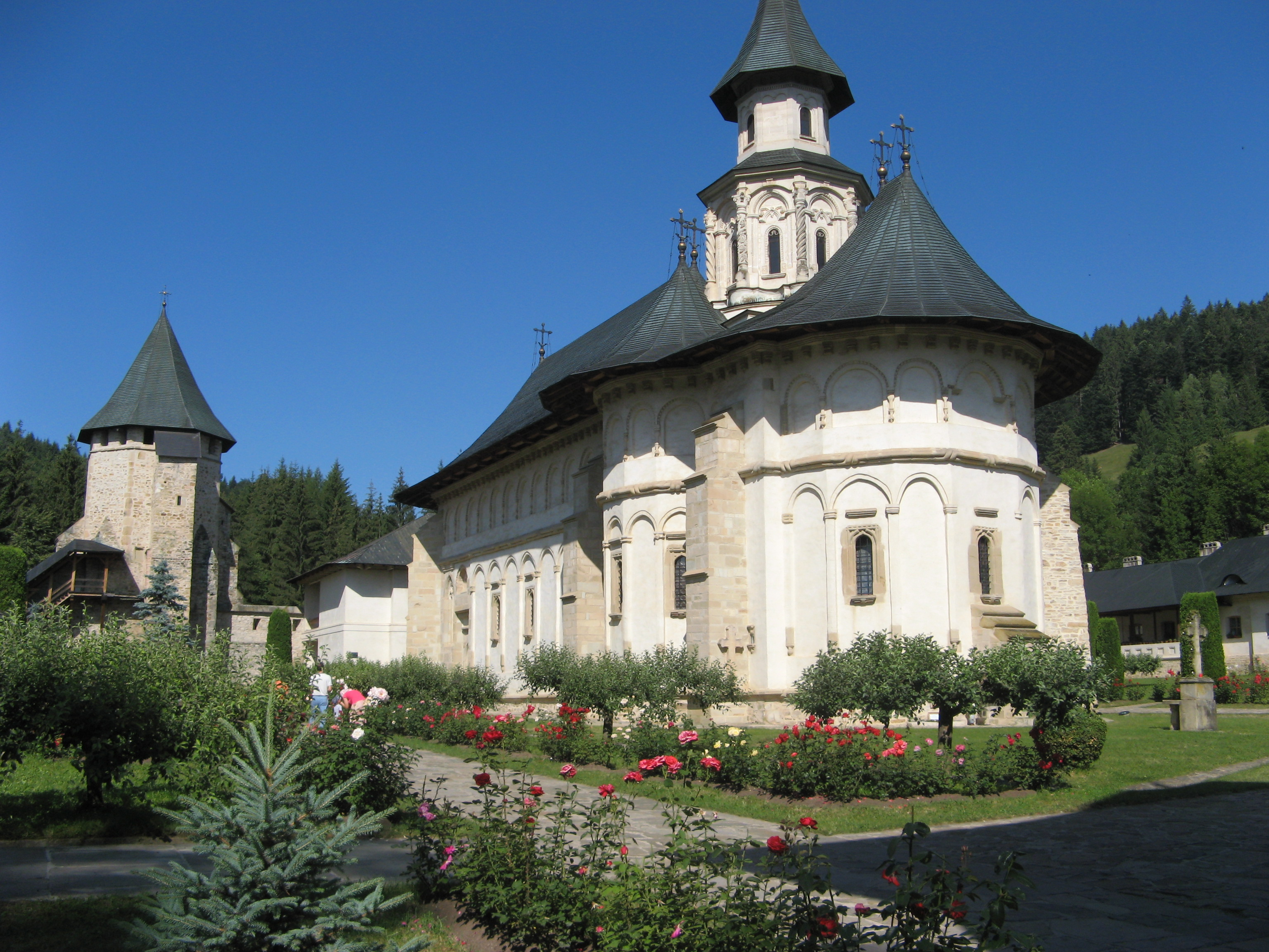 Biserica „Adormirea Maicii Domnului” 01